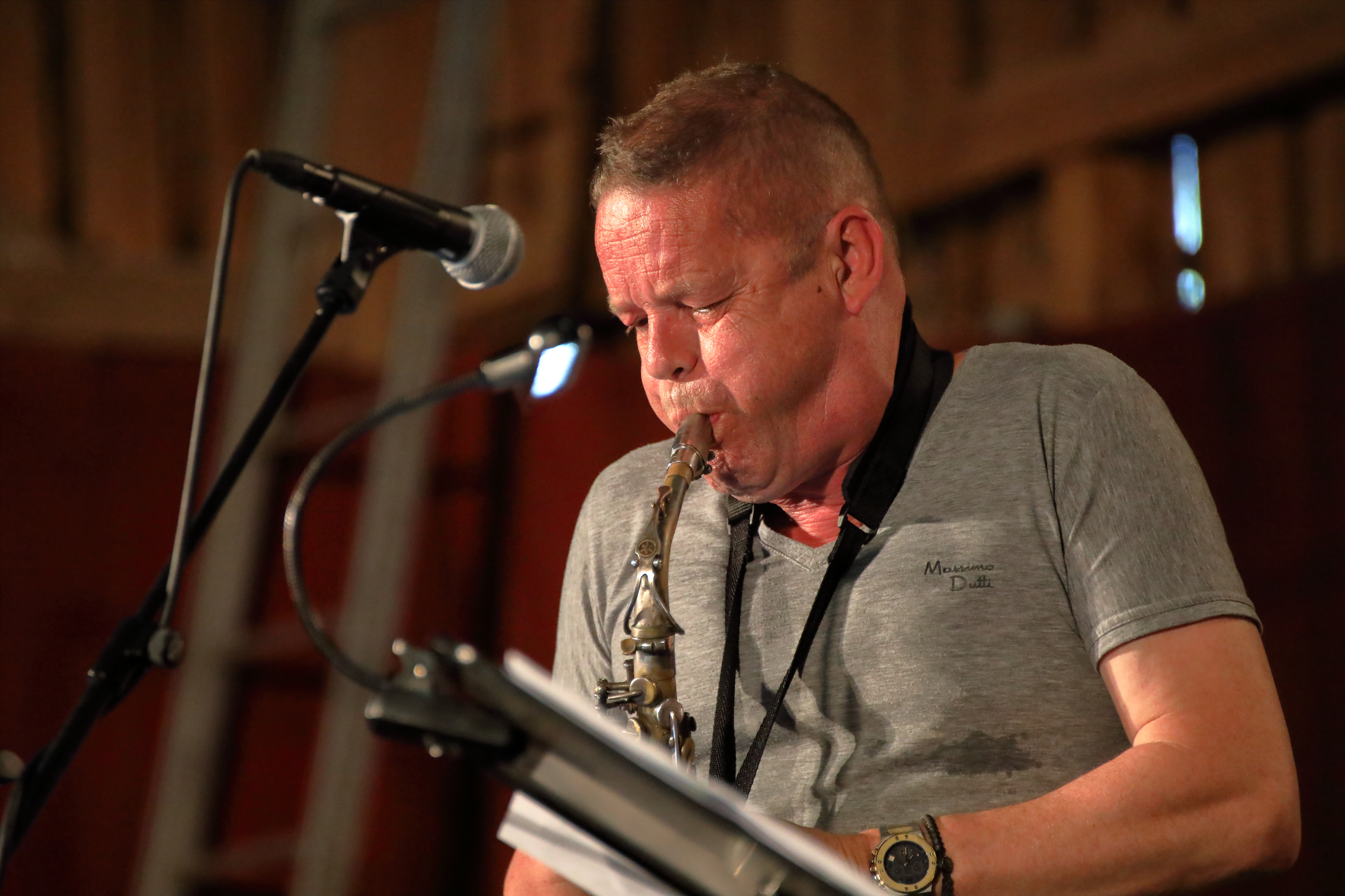 Ray Anderson (tb), Han Bennink (dr), Ernst Glerum (db) und Paul van Kemenade (alto sax) auf dem INNtöne Jazzfestival 2019.